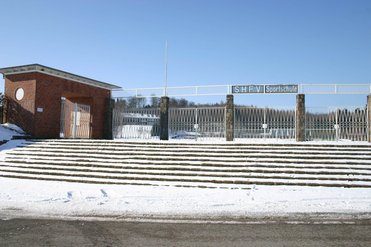 Sportschule Malente